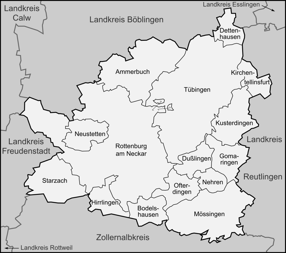 Karte der Gemeinden des Landkreises Tübingen